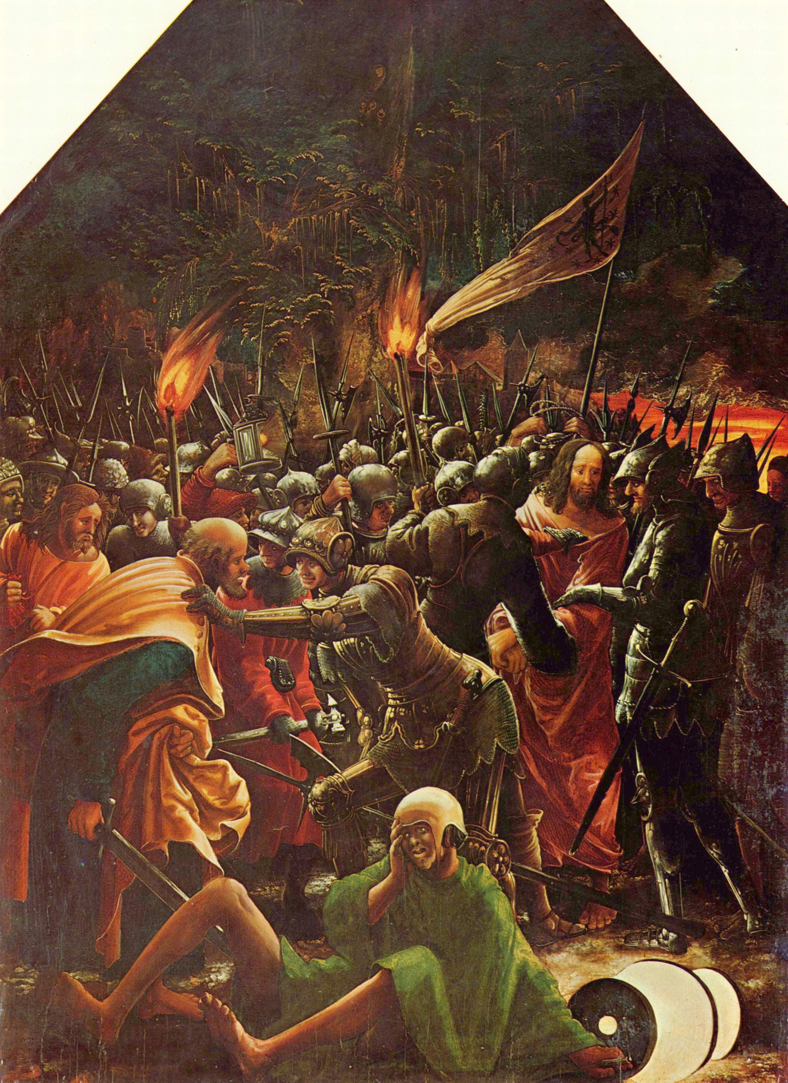 linker Innenflügel zur Passion Christi, Szene oben rechts: Gefangennahme Christi